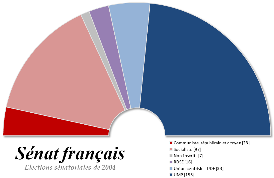 Composition du Sénat Français après renouvellement de la série C suite aux élections du 26/09/2004